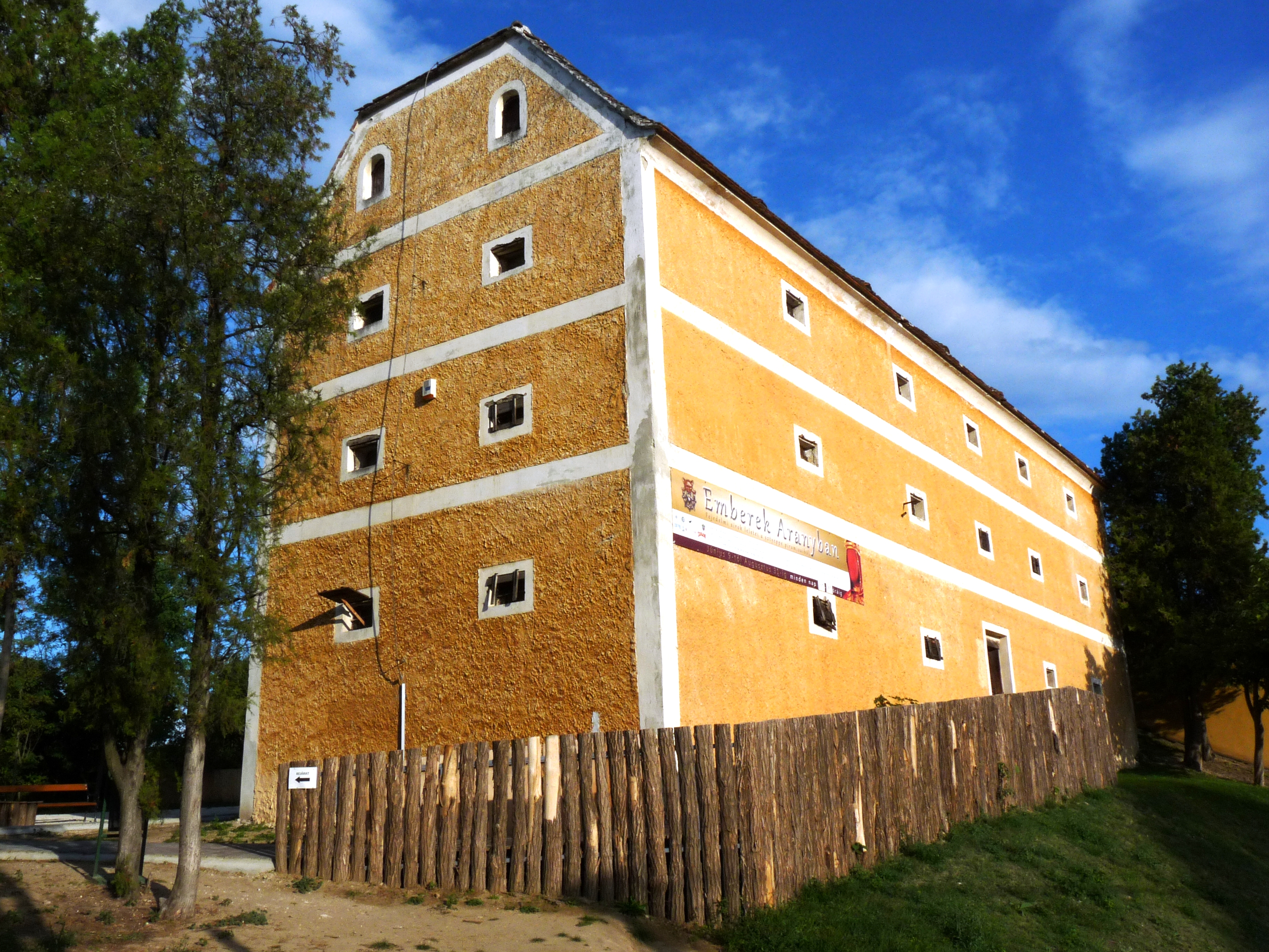 magtár, Balatonszemes This is a photo of a monument in Hungary. Identifier: 7795